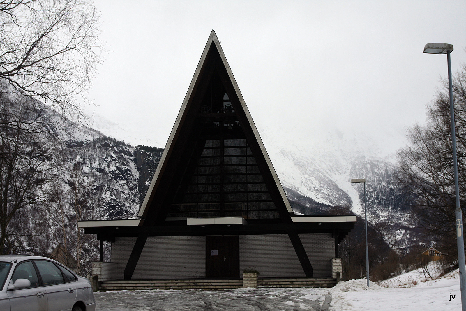 Tyssedal kirke_vinteren_2009